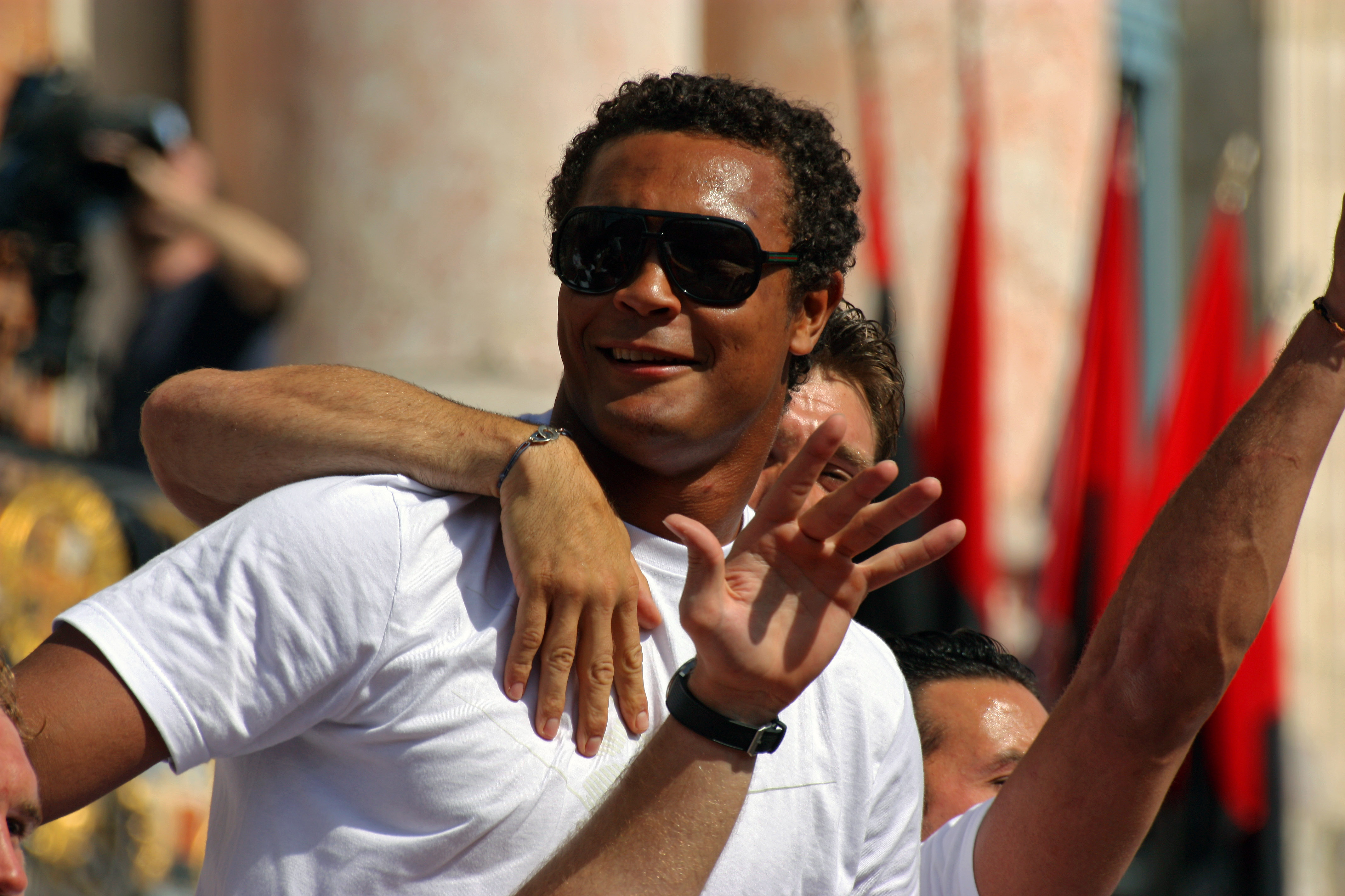 Thierry Dusautoir, place du capitole, fêtant le 18e titre de champion de France.